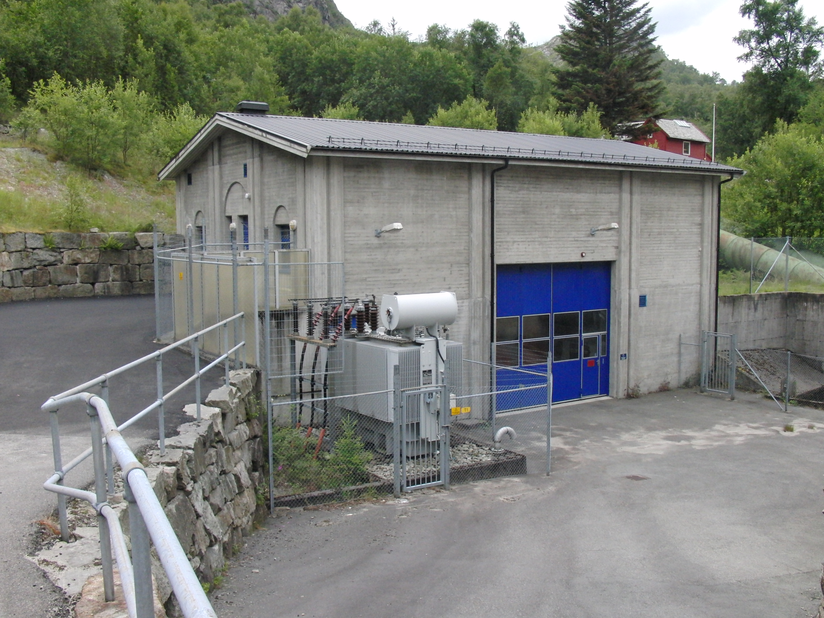 Oltedal nye kraftverk